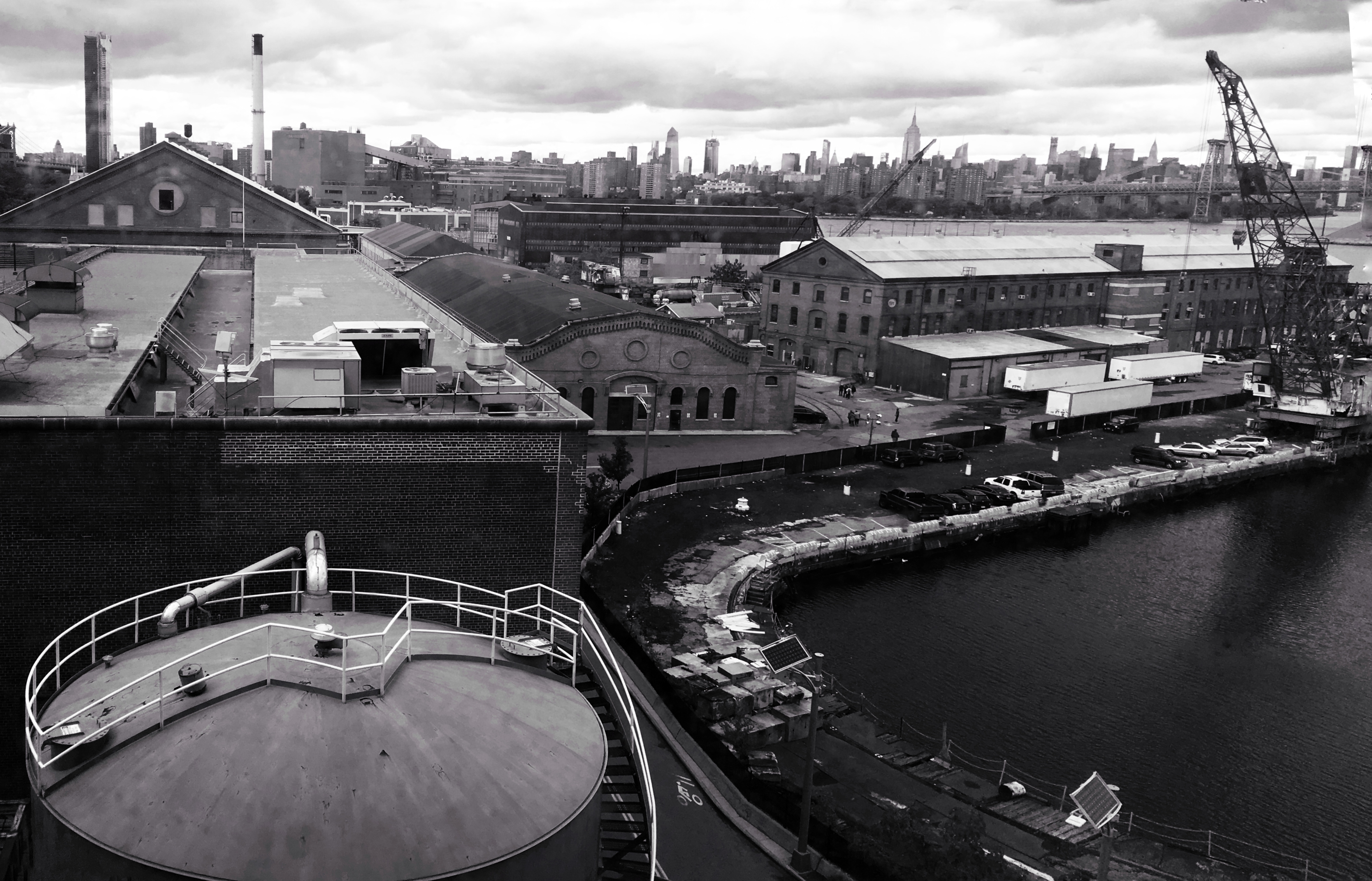 俯瞰布魯克林造船廠Site: Brooklyn Navy Yard